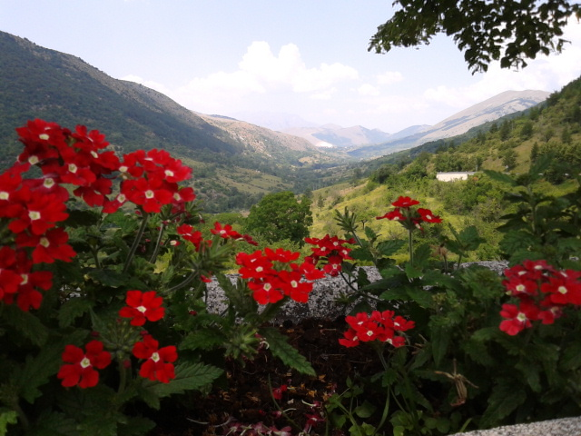 Foto panoramica sui monti della Marsica da San Sebastiano dei Marsi